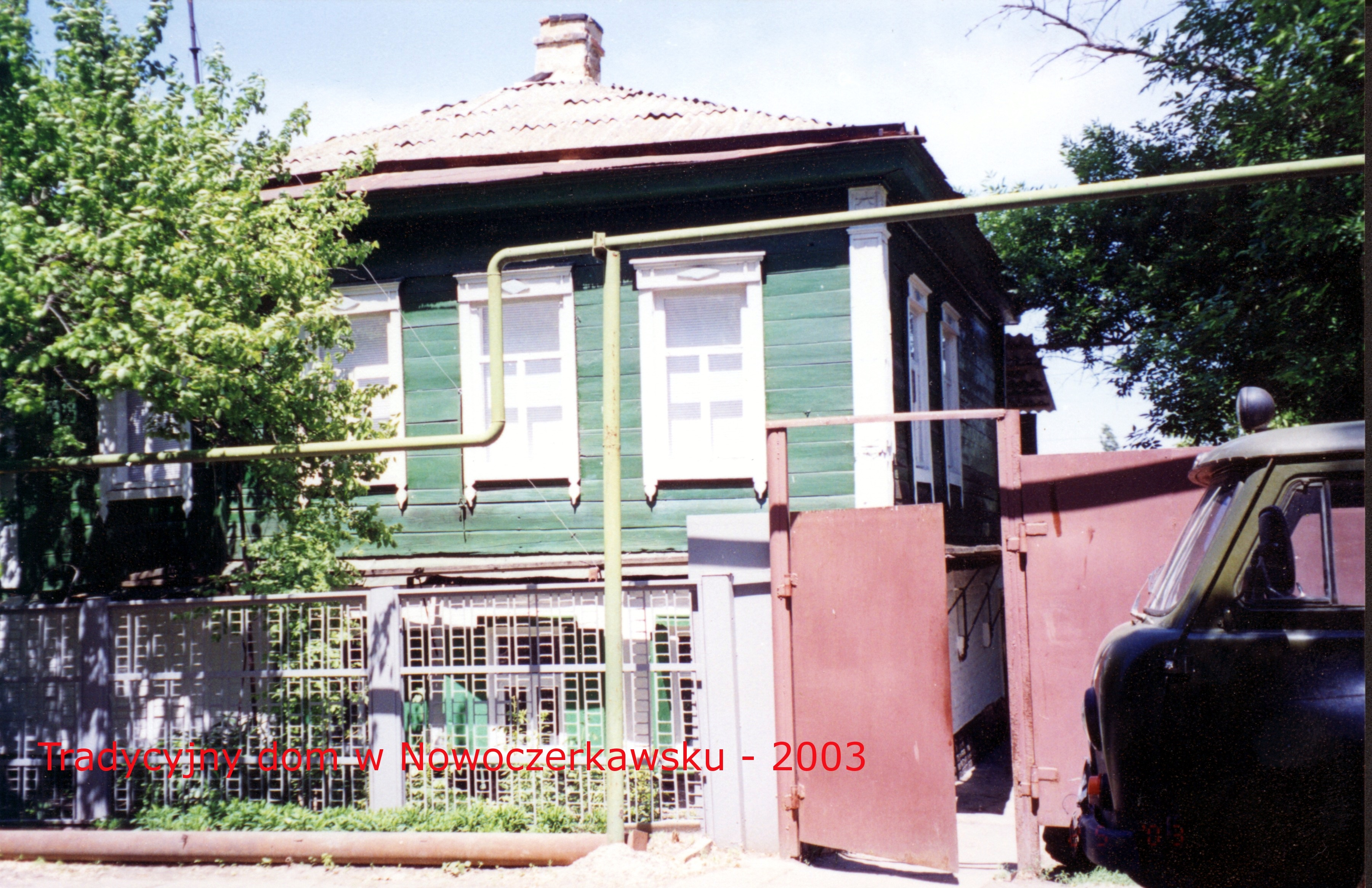 Dom w Staroczerkassku